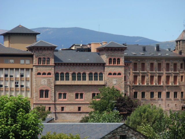 Palau Episcopal (la Seu d'Urgell). Vista des del Parc del Segre.